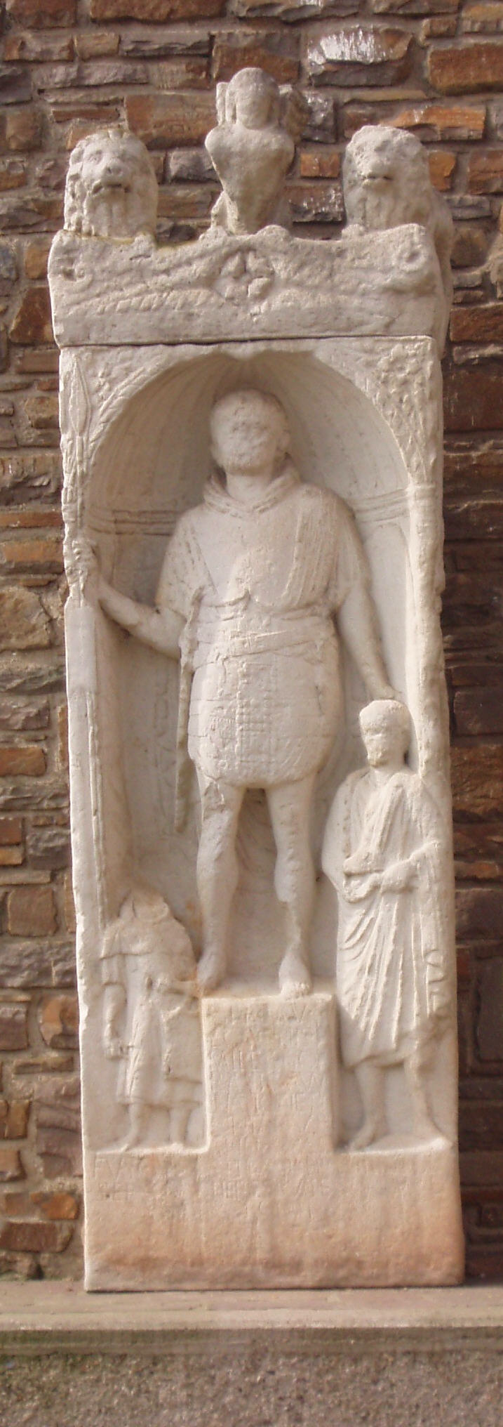 Andernach, Mittelrhein: Grabstein des römischen Soldaten Firmus aus dem 1. Jahrhundert n. Chr. Nachweis: CIL XIII 07684. Text: [F]irmus / Ecconis f(ilius) / mil(es) ex coh(orte) / Raetorum / natione M / ontanus / ann(orum) XXXVI /stip(endiorum) X[V]II(?) / heres [e]x tes(tamento) / po[sui]t // Fuscus / serv[u]s // [